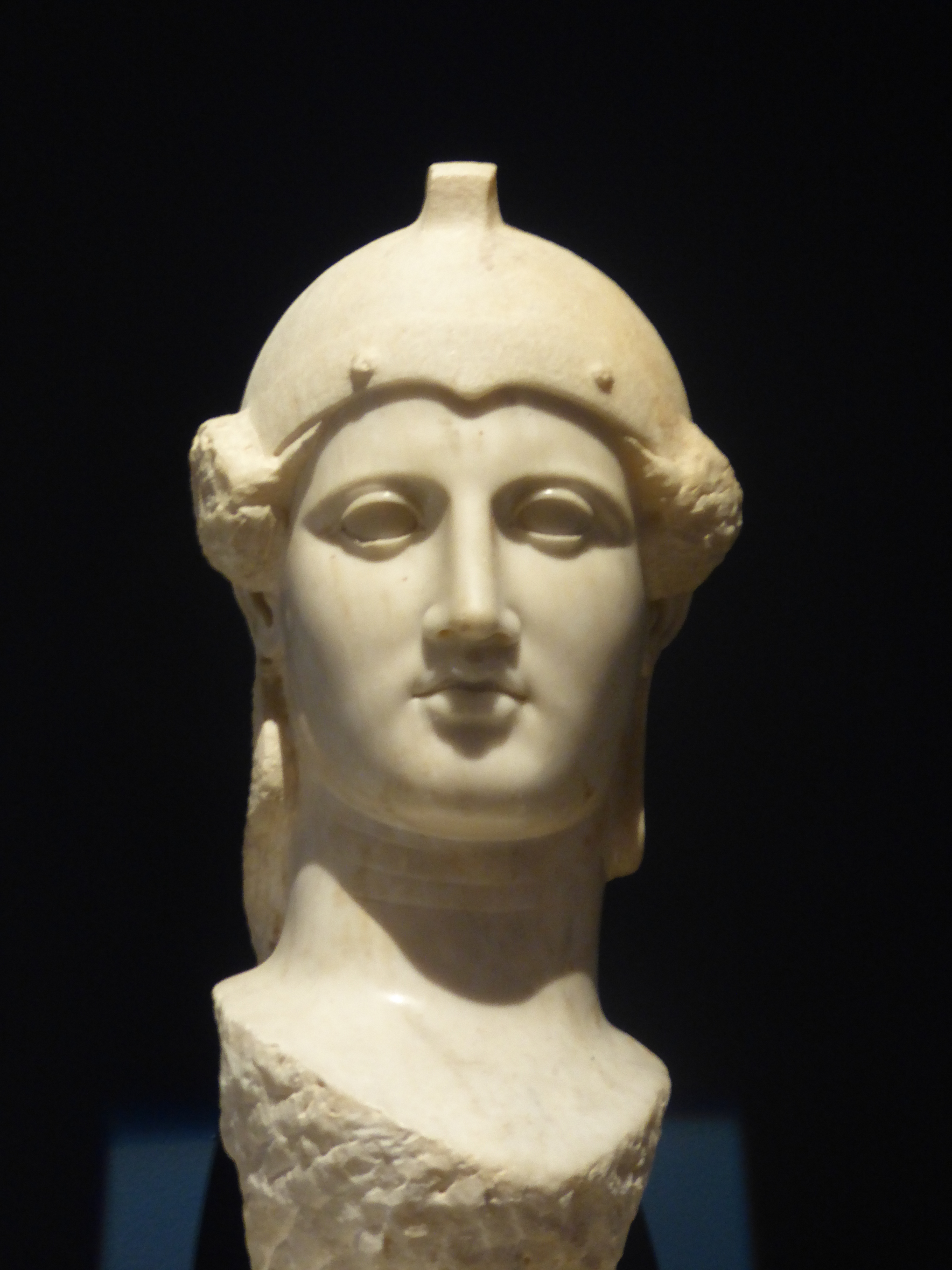 photo du buste